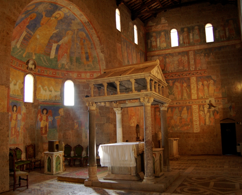 Una veduta degli affreschi della Basilica di Sant'Elia a Castel Sant'Elia (provincia di Viterbo) (fotografia scattata da campaz con il permesso della persona che custodisce la chiesa)